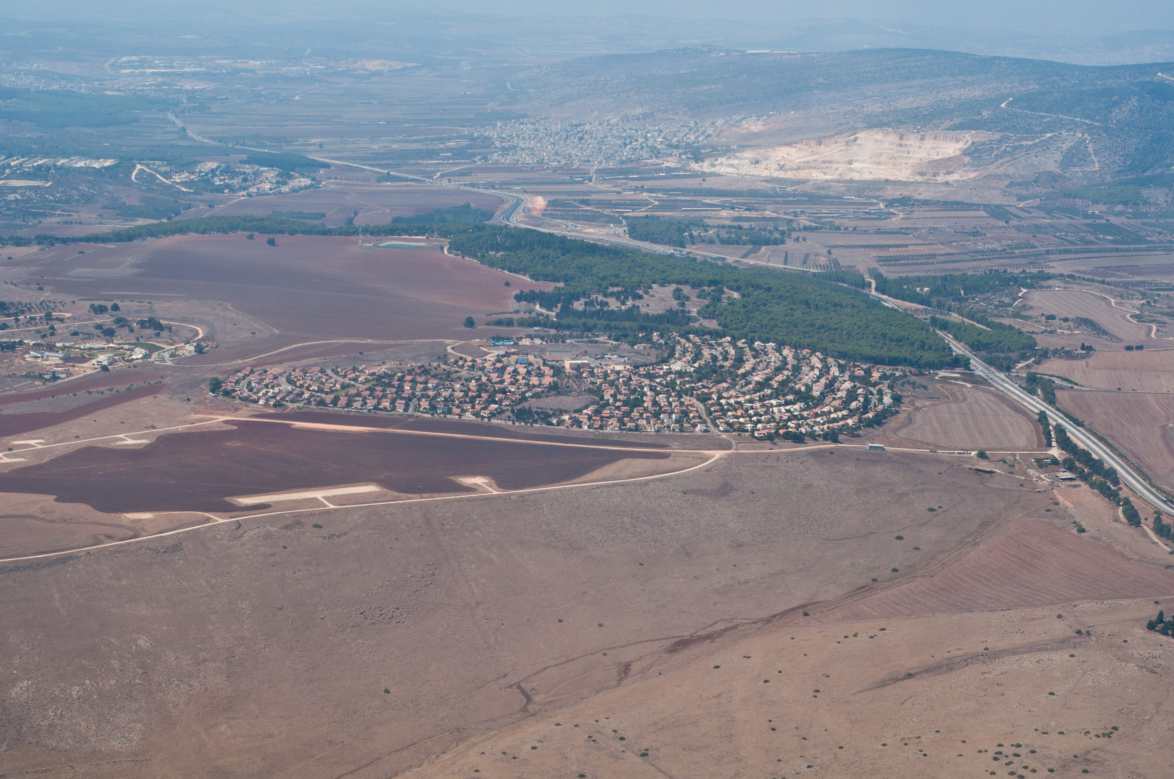 גבעת אבני